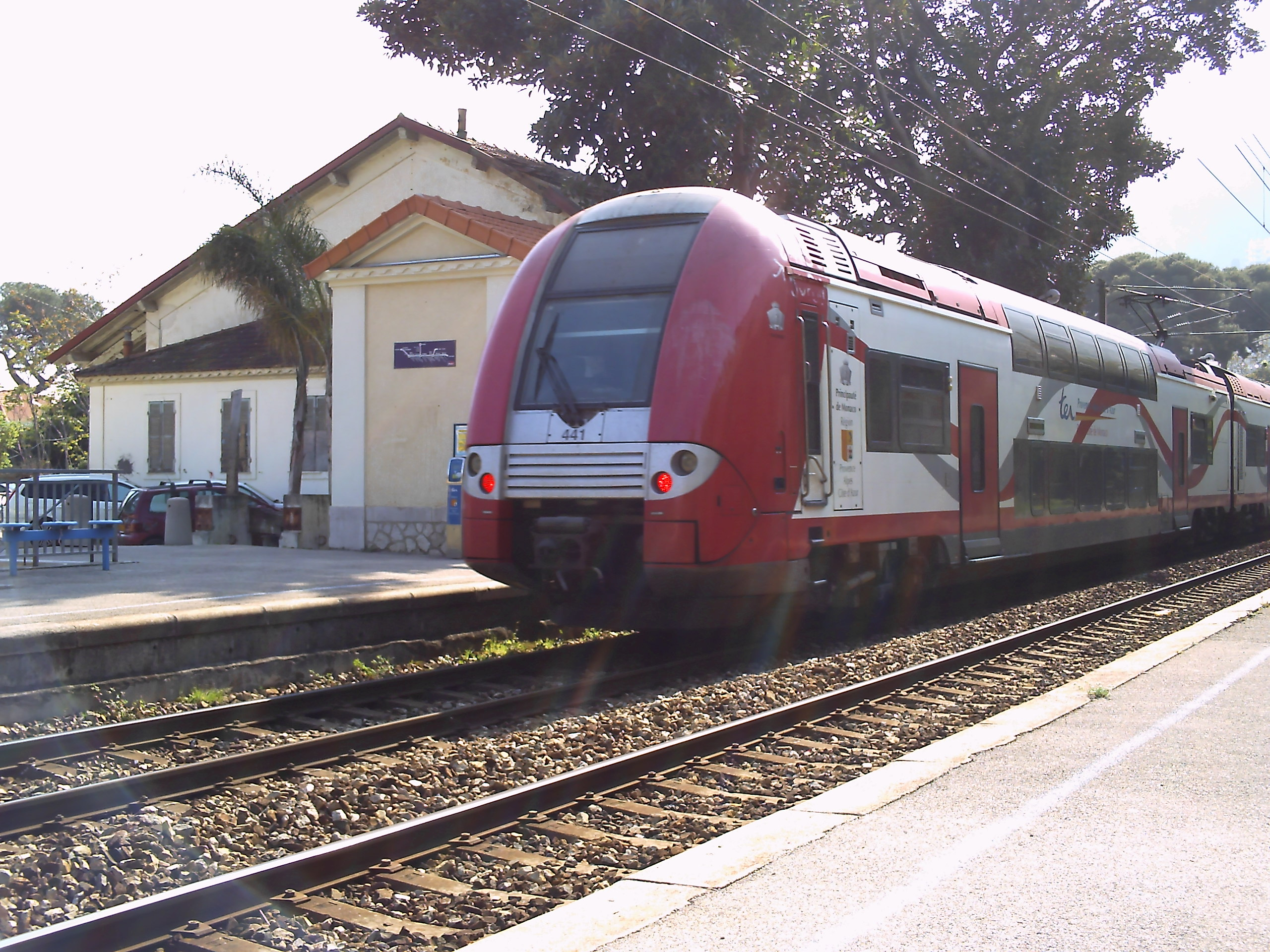 Z24500 aux couleurs monégasques, marquant l'arrêt à Roquebrune-Cap-Martin